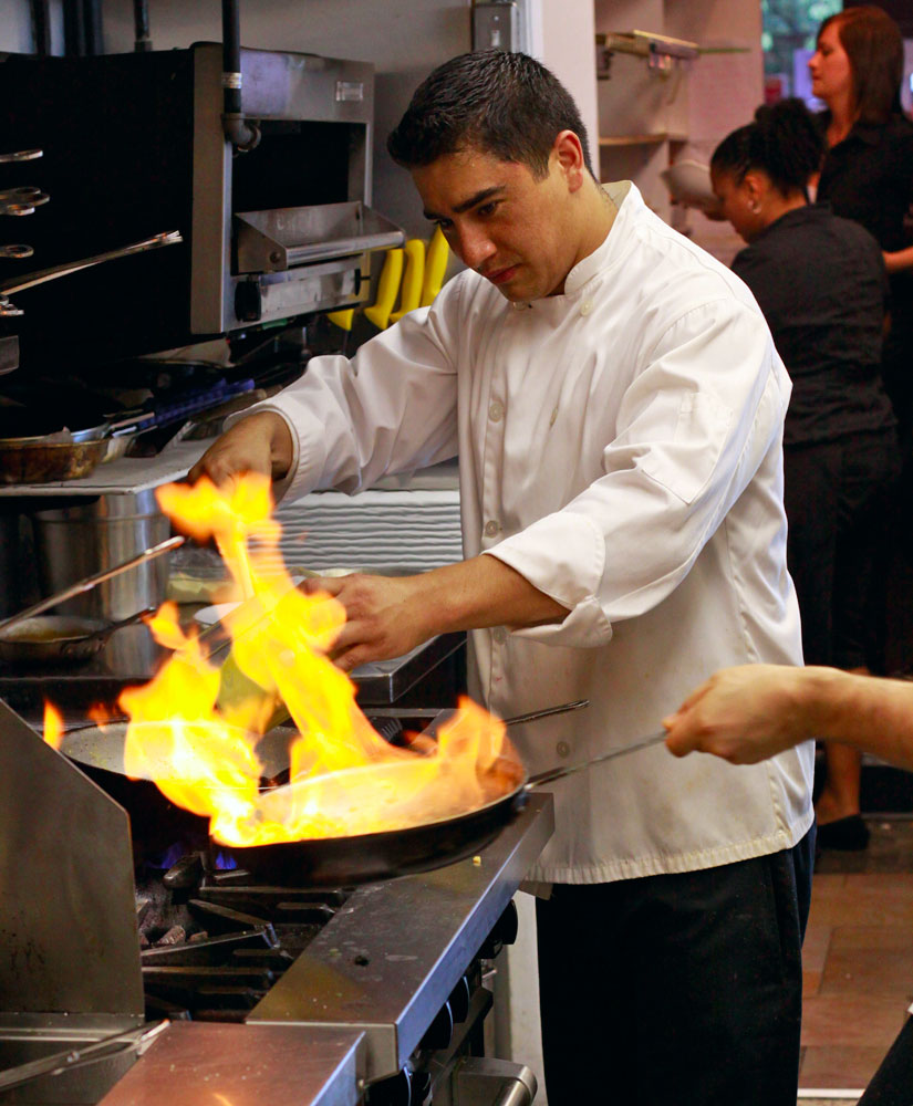 Flambé in a skillet